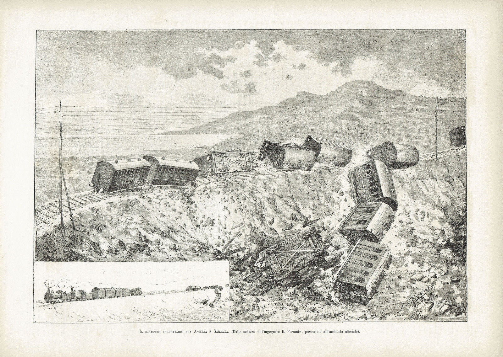 Opera che descrive il disastro ferroviario tra Avenza e Sarzana, avvenuto nel 1881.